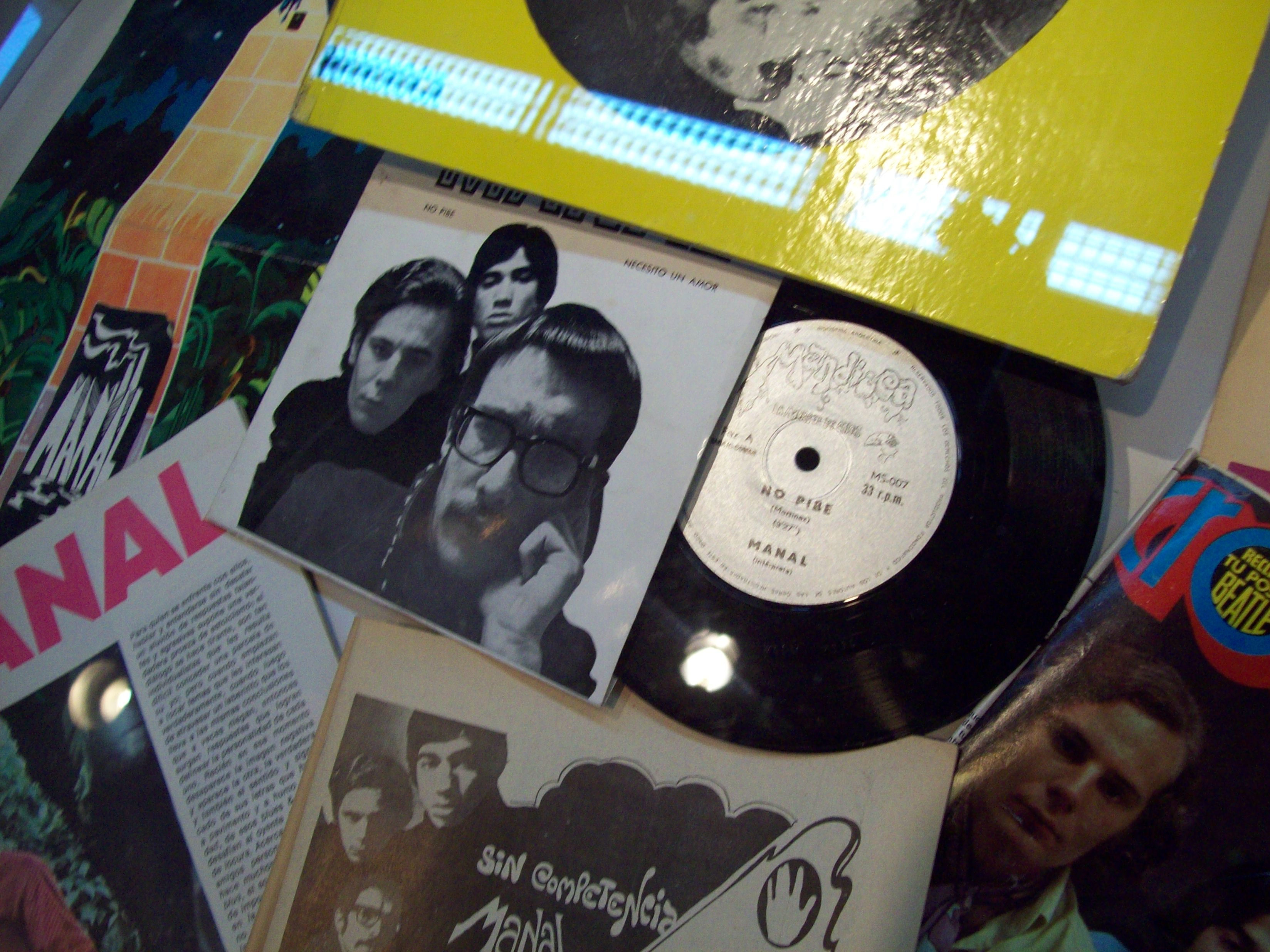 "No pibe" de Manal, editado por Mandioca, sello de Jorge Álvarez, en la muestra de la Biblioteca Nacioal Pidamos peras a Jorge Álvarez.